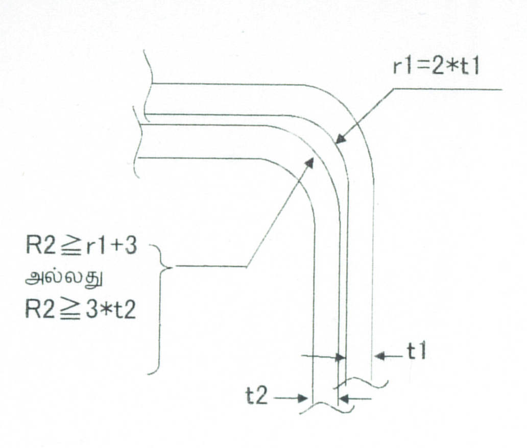 ஆரம் தேர்ந்தெடுப்பது